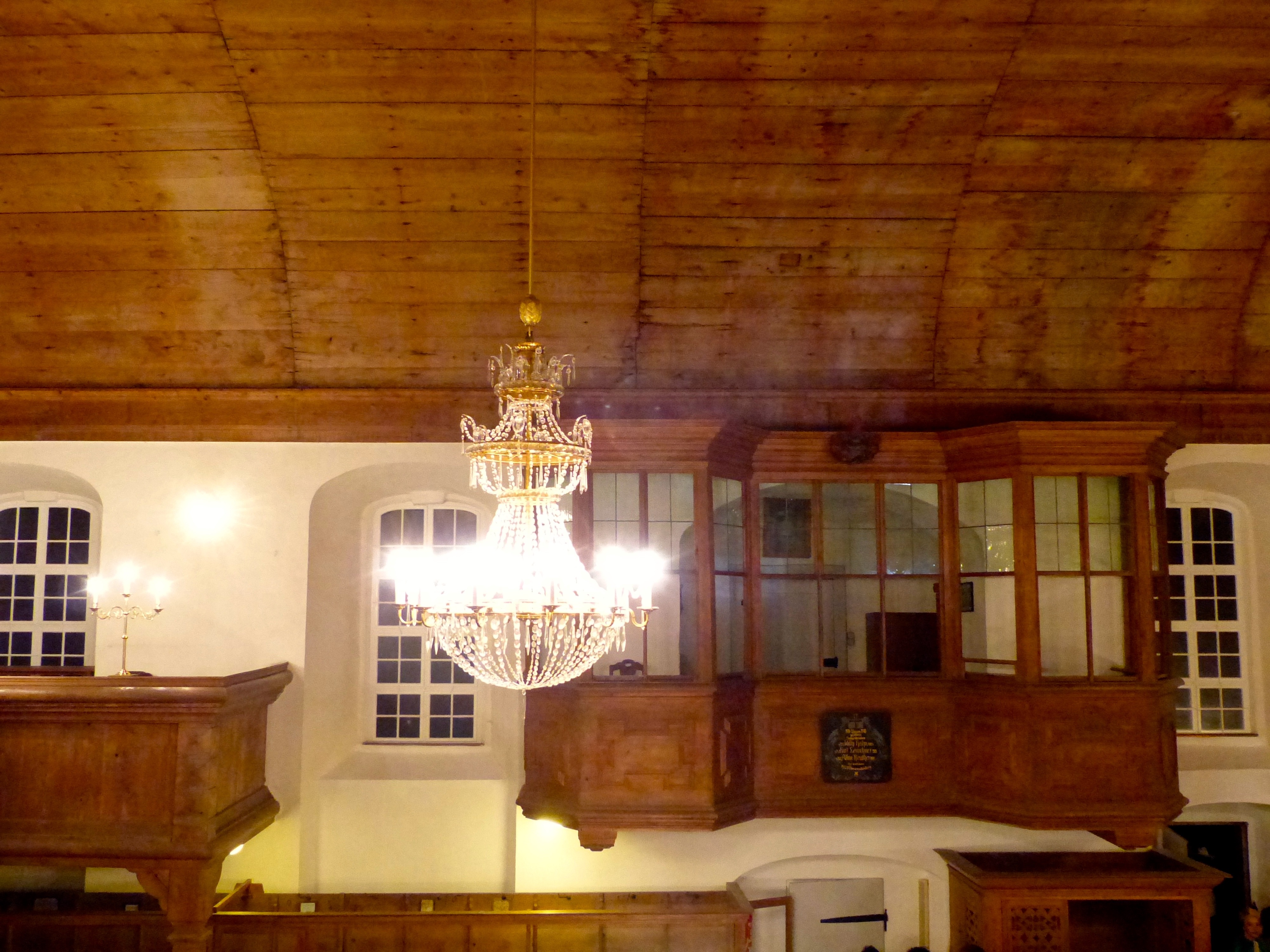 Exulantenkirche Oberneuschönberg: Tonnengewölbe, geschlossene Empore und Kronleuchter